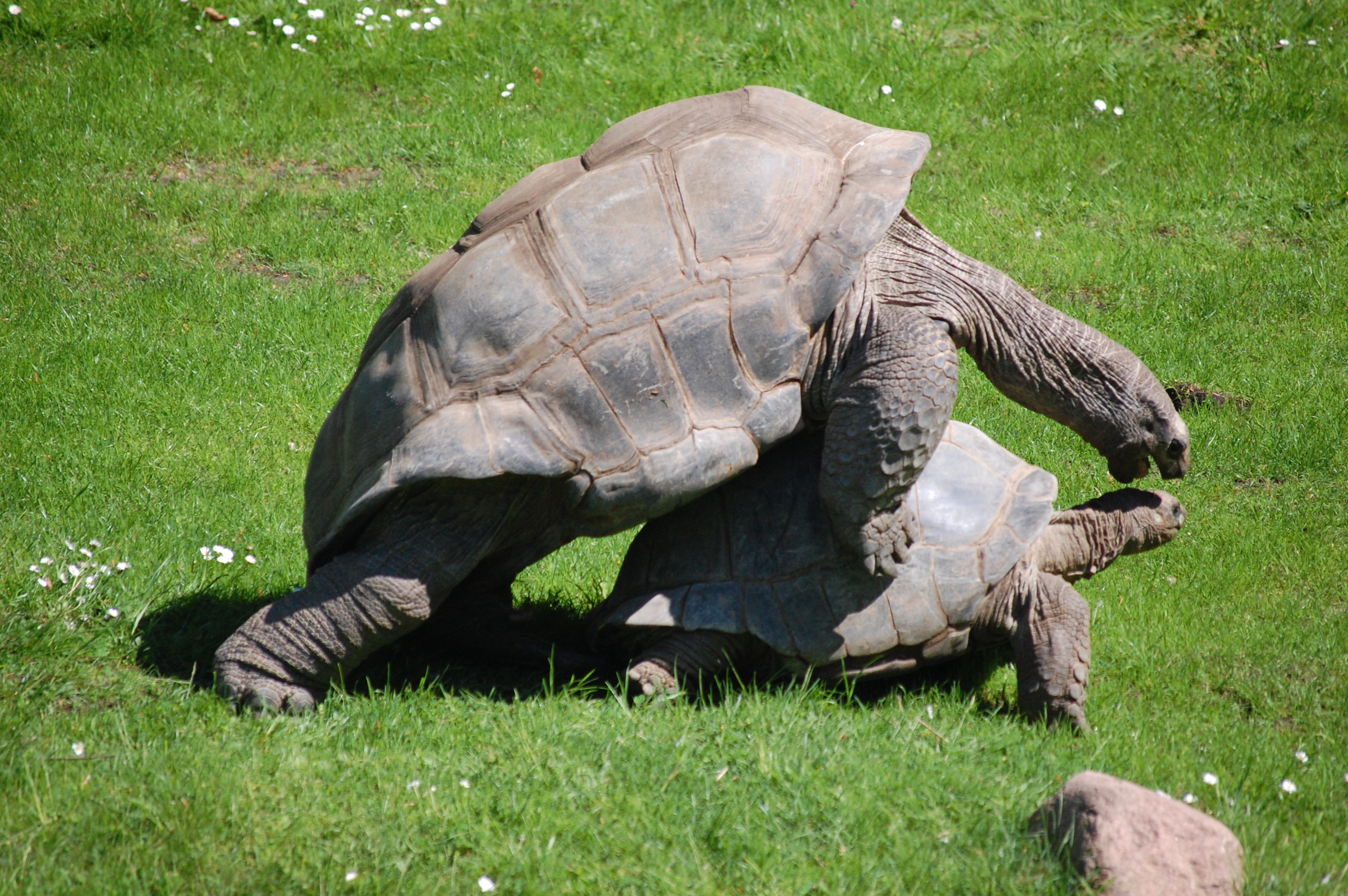 Galapagos Schildkroeten bei der Paarung